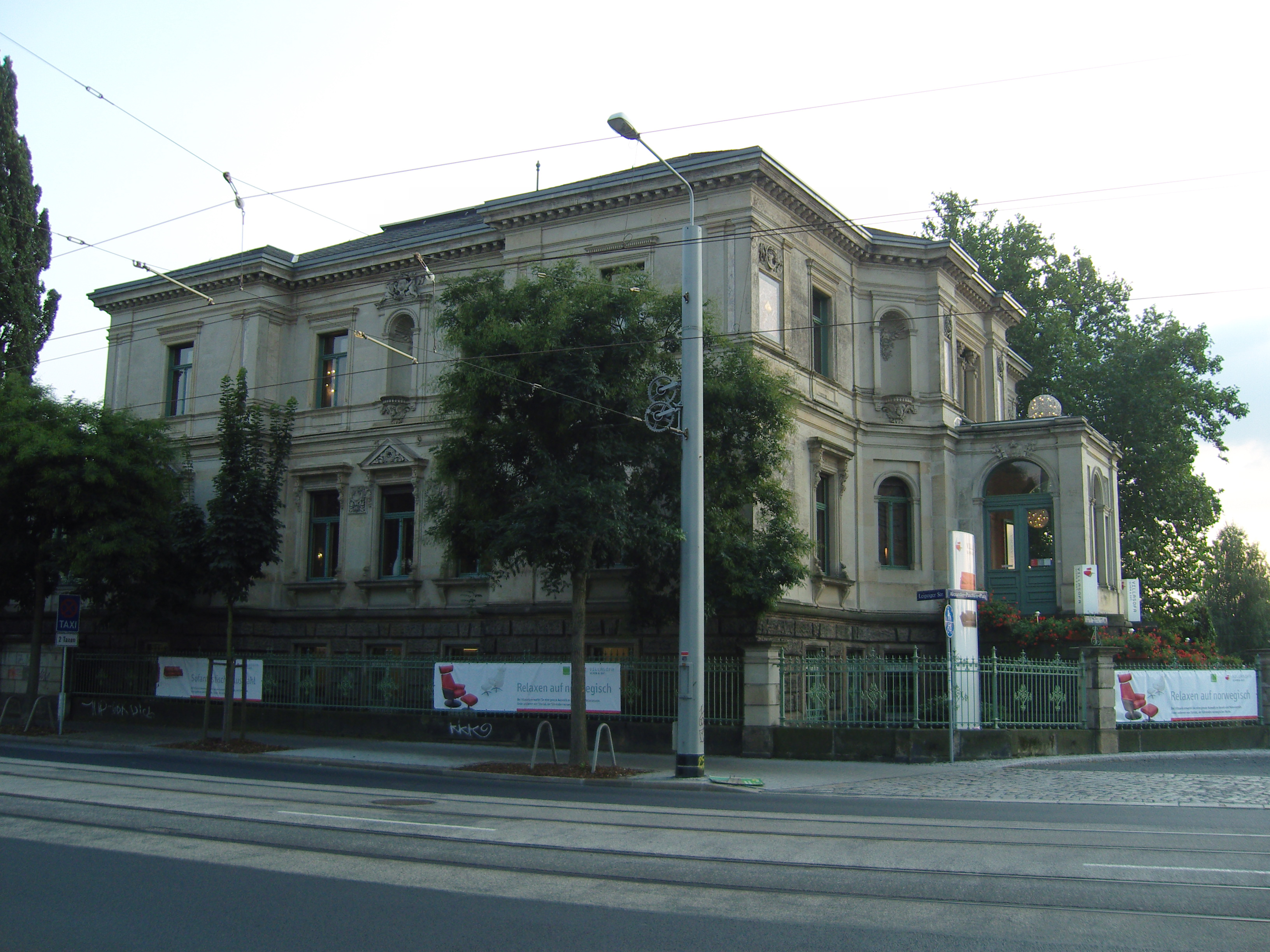 Villa Grumbt an der Leipziger Straße am Alexander-Puschkin-Platz in Dresden, ehemaliges Wohnhaus von Carl Ernst Grumbt, später Haus der Deutsch-Sowjetischen Freundschaft, jetzt „Deutschlands schönstes Möbelhaus“ (Villa Sofa). 360°-Panorama-Rundblick der Räumlichkeiten auf